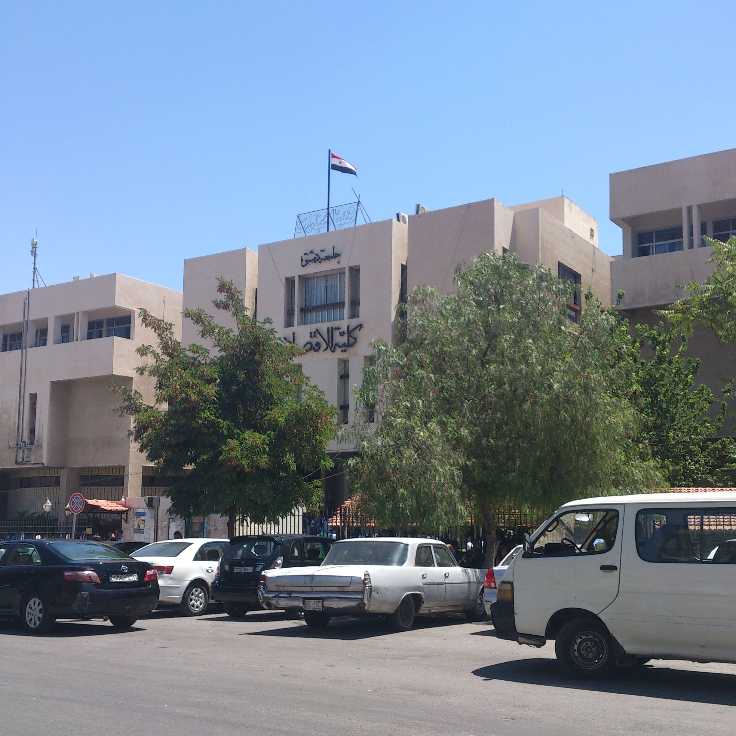 حي البرامكة